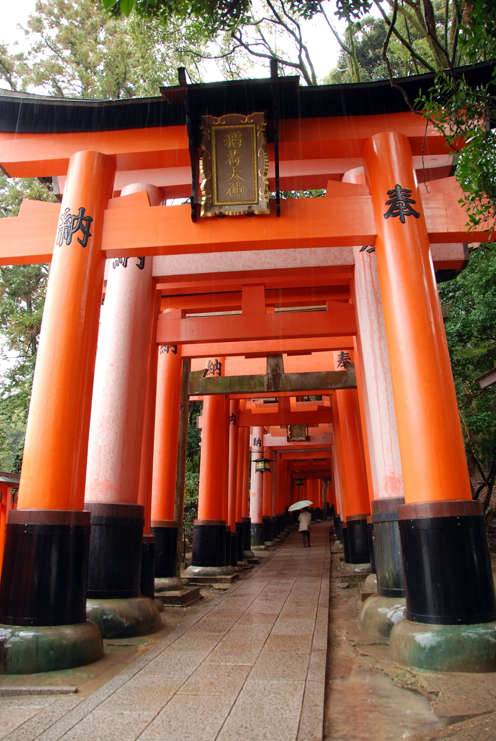 Fushimi Inari Tapınağı